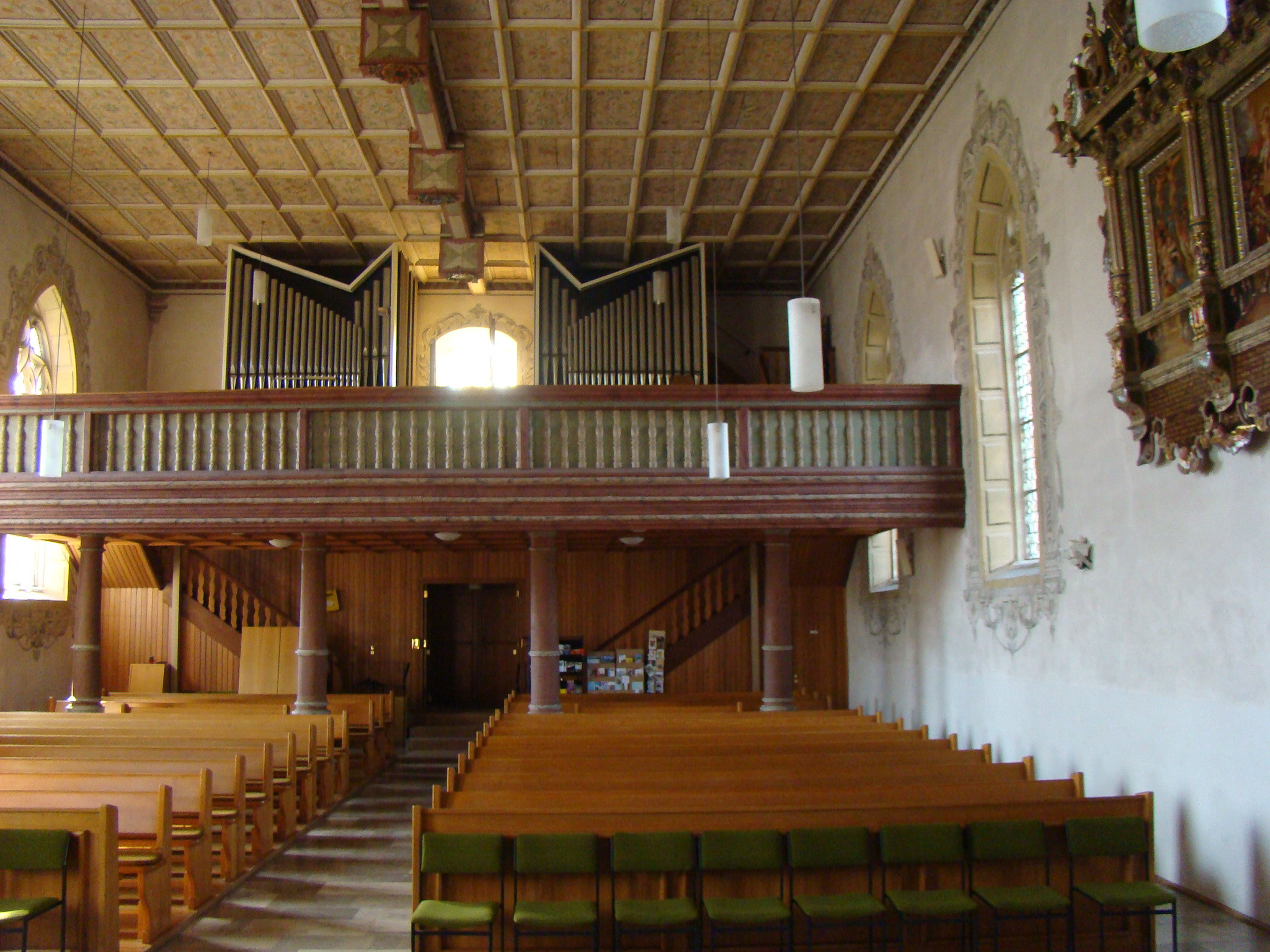 Blick zur Orgelempore der Kilianskirche in Obersulm-Sülzbach